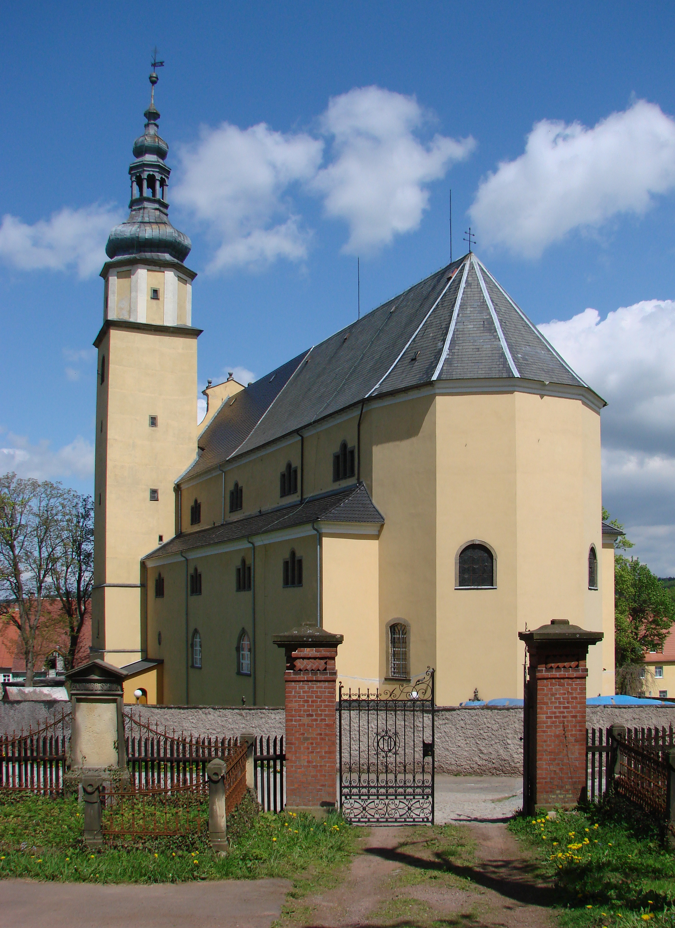 Chełmsko Śląskie - kościół parafialny p.w. Świętej Rodziny, 1680-1690 (zabytek nr rejestr. A/2048/1008 z 8.01.1964)